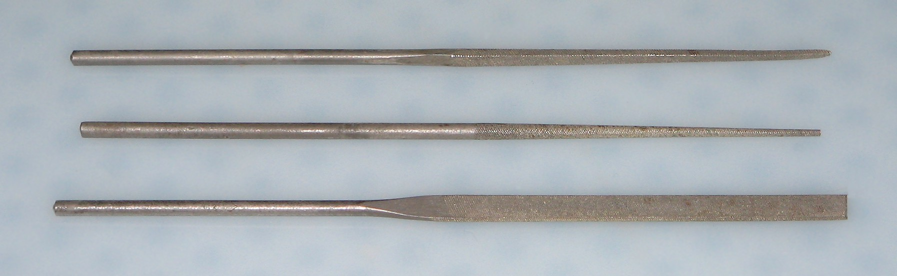 Fajletoj La foto estis farita de mi mem.